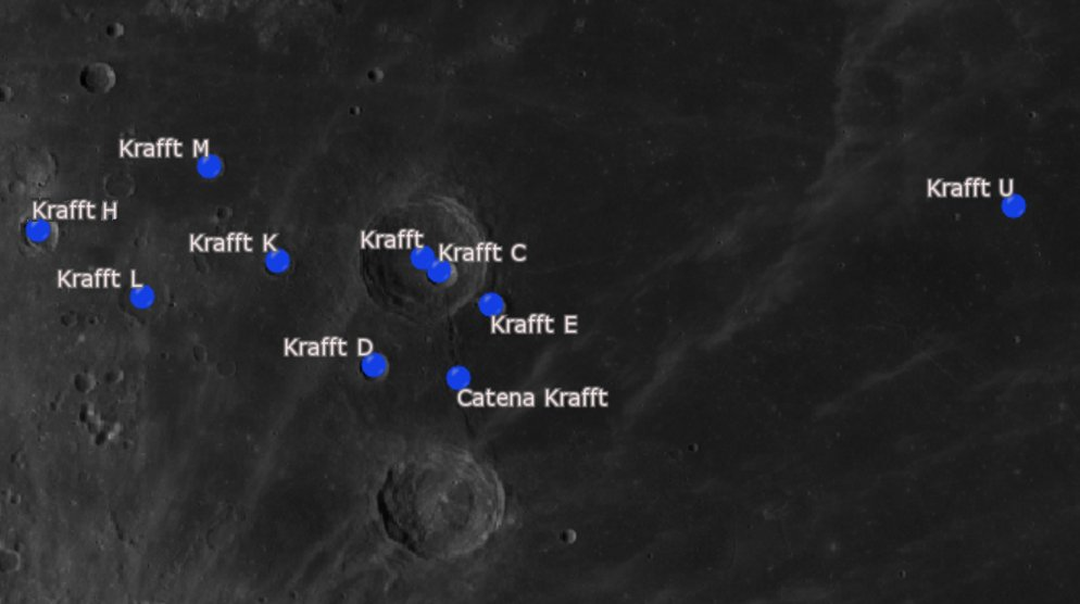 Cráter lunar Krafft. Cráteres satélite. (Imagen LRO)